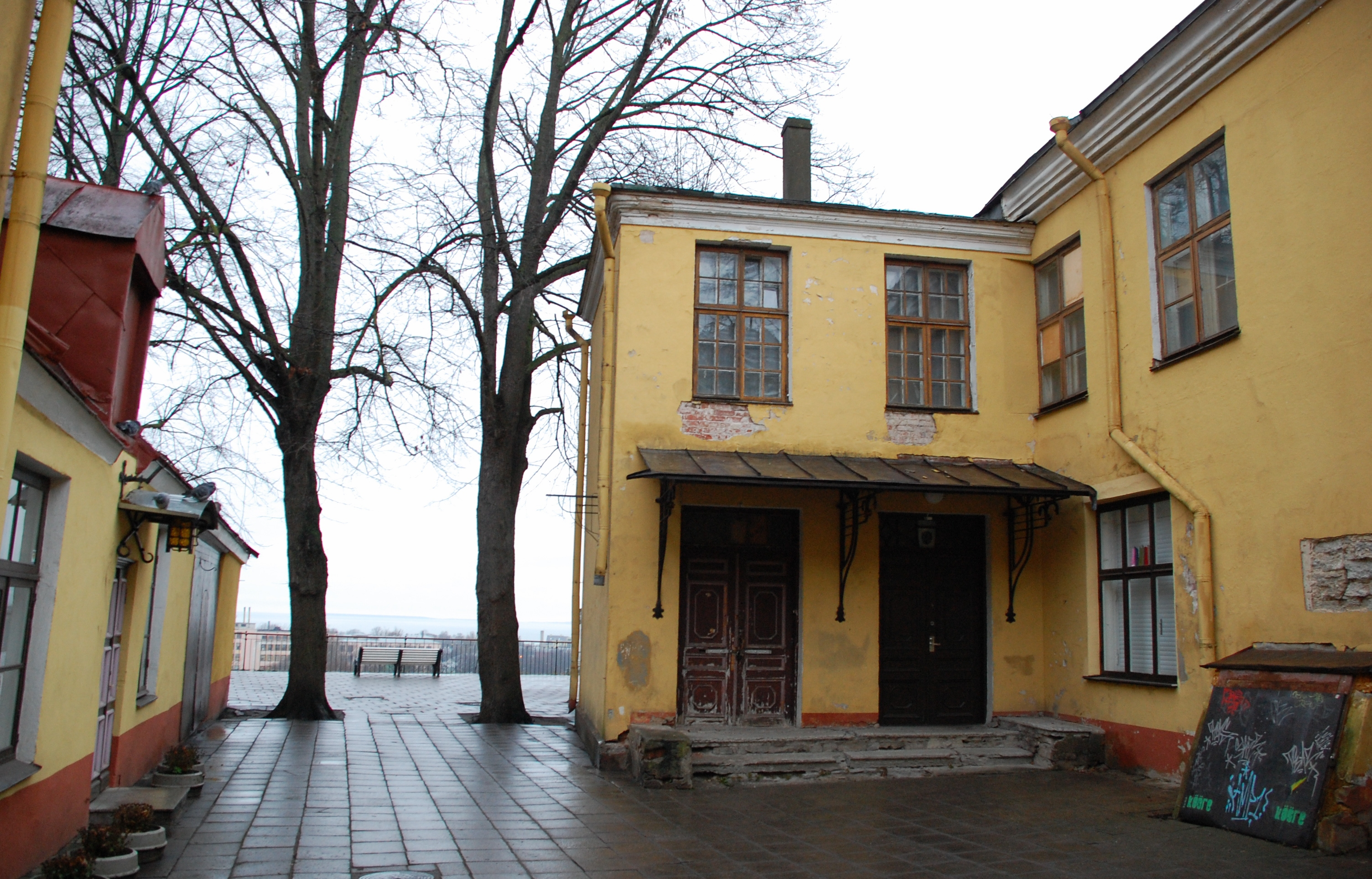 Tallinn, Estonia